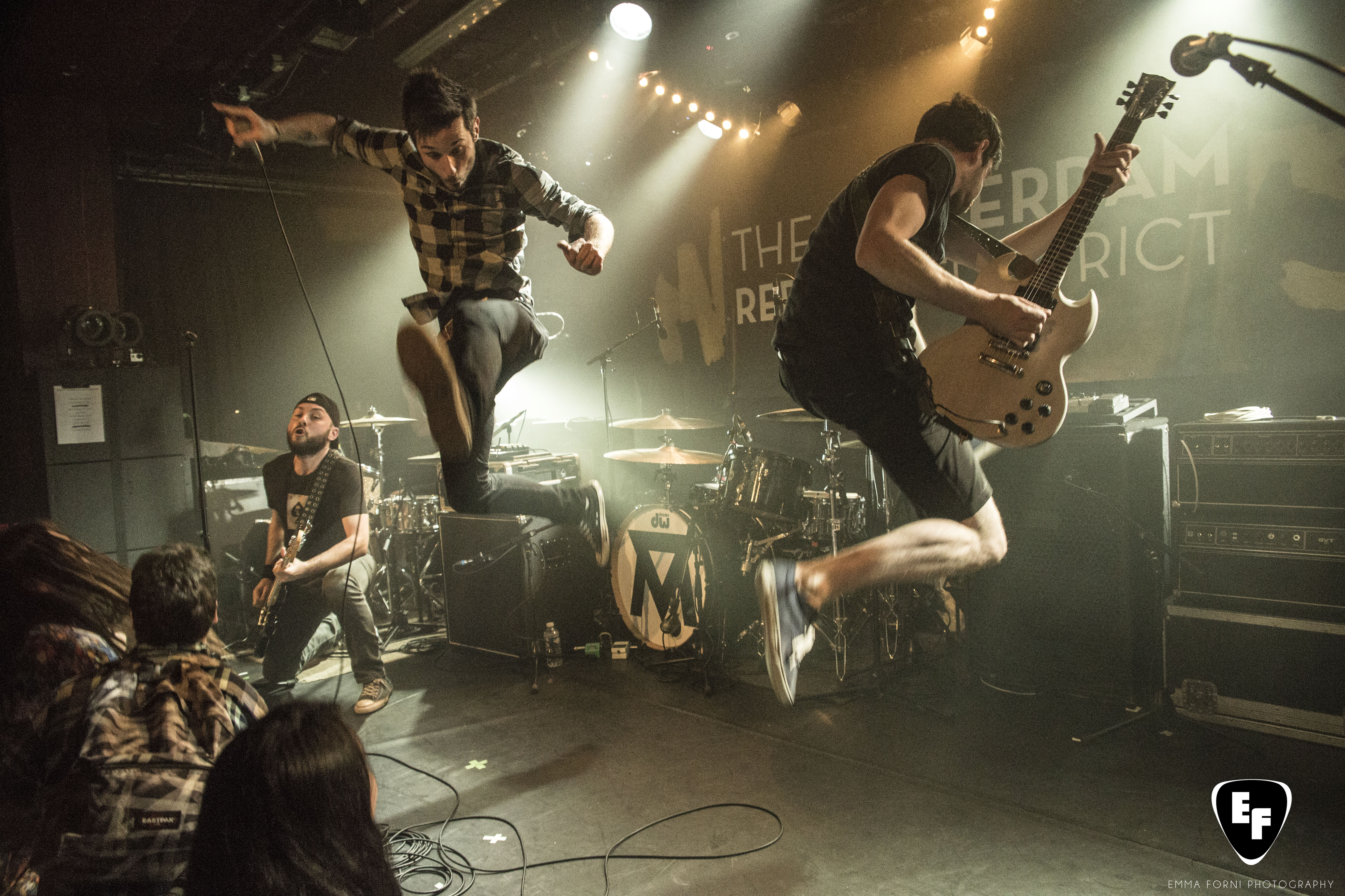 TARLD en concert à La Maroquinerie de Paris le 10 mars 2015 en ouverture du groupe Marmozets. par la photographe: Emma Forni